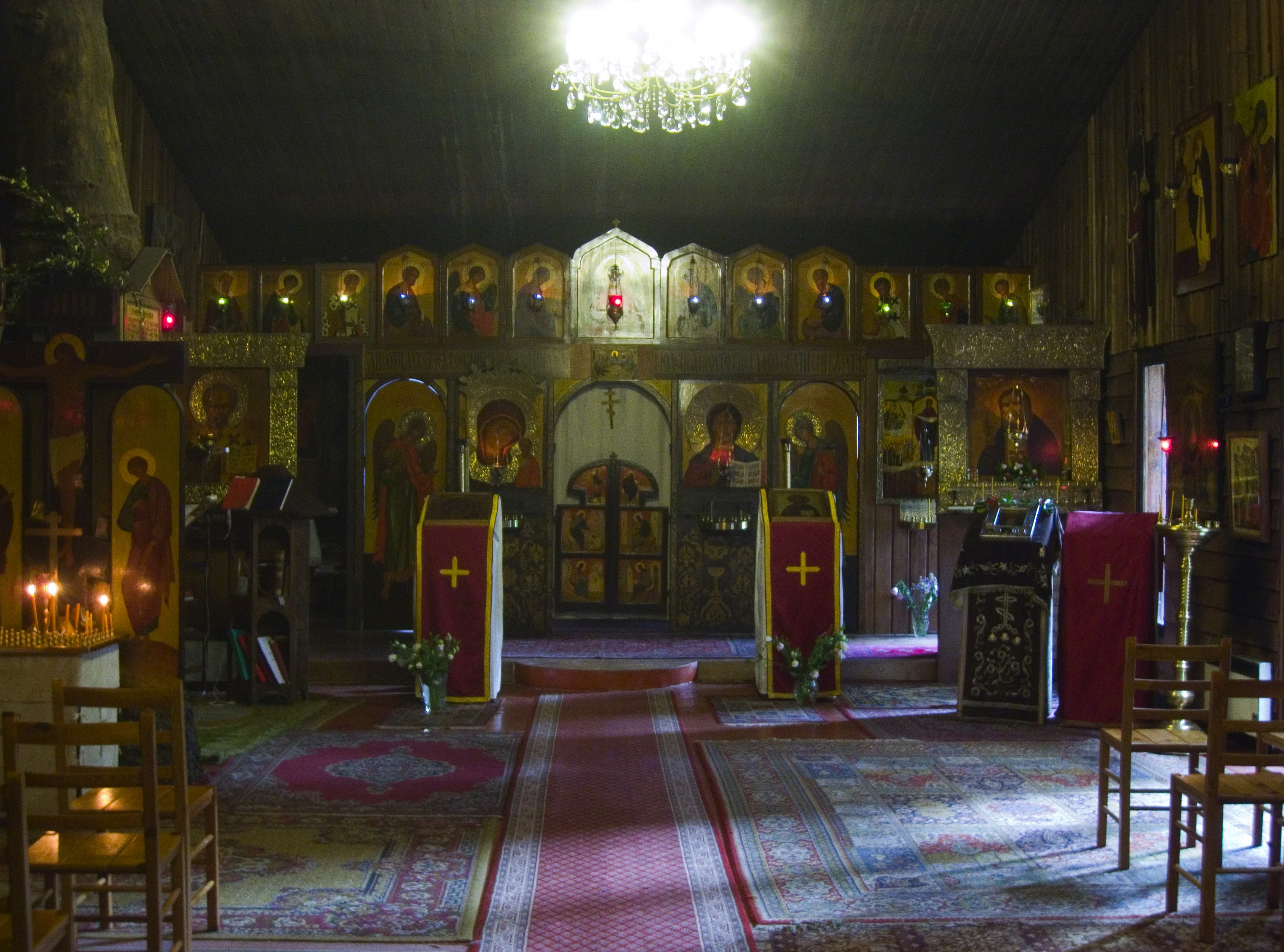 Intérieur simple.